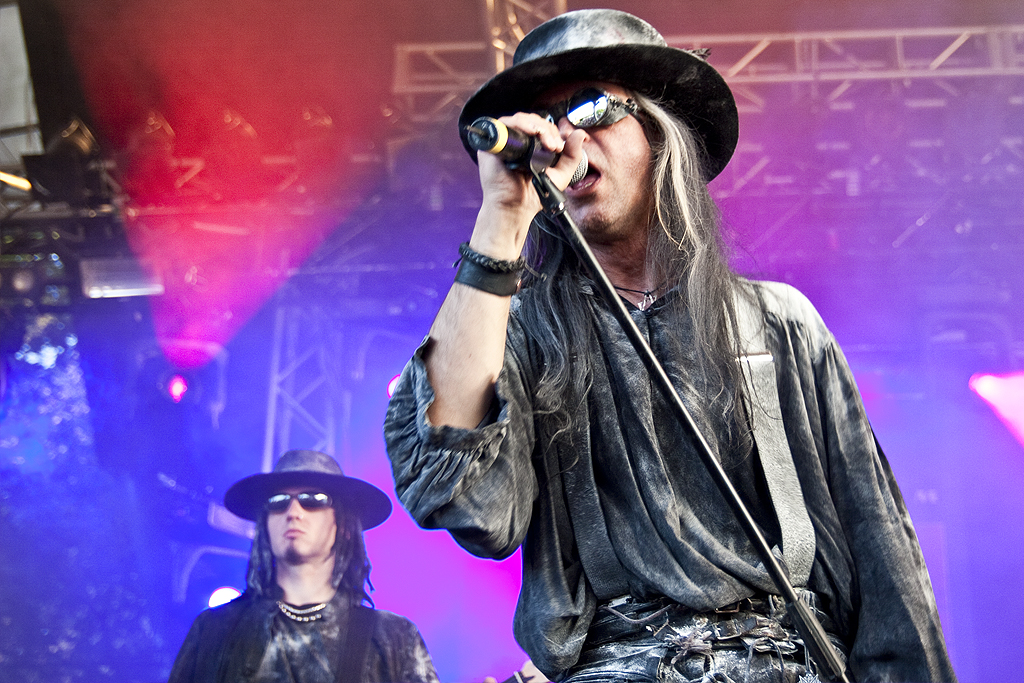 Foto von Fields of the Nephilim, aufgenommen auf dem Amphi Festival 2013 in Köln, Deutschland